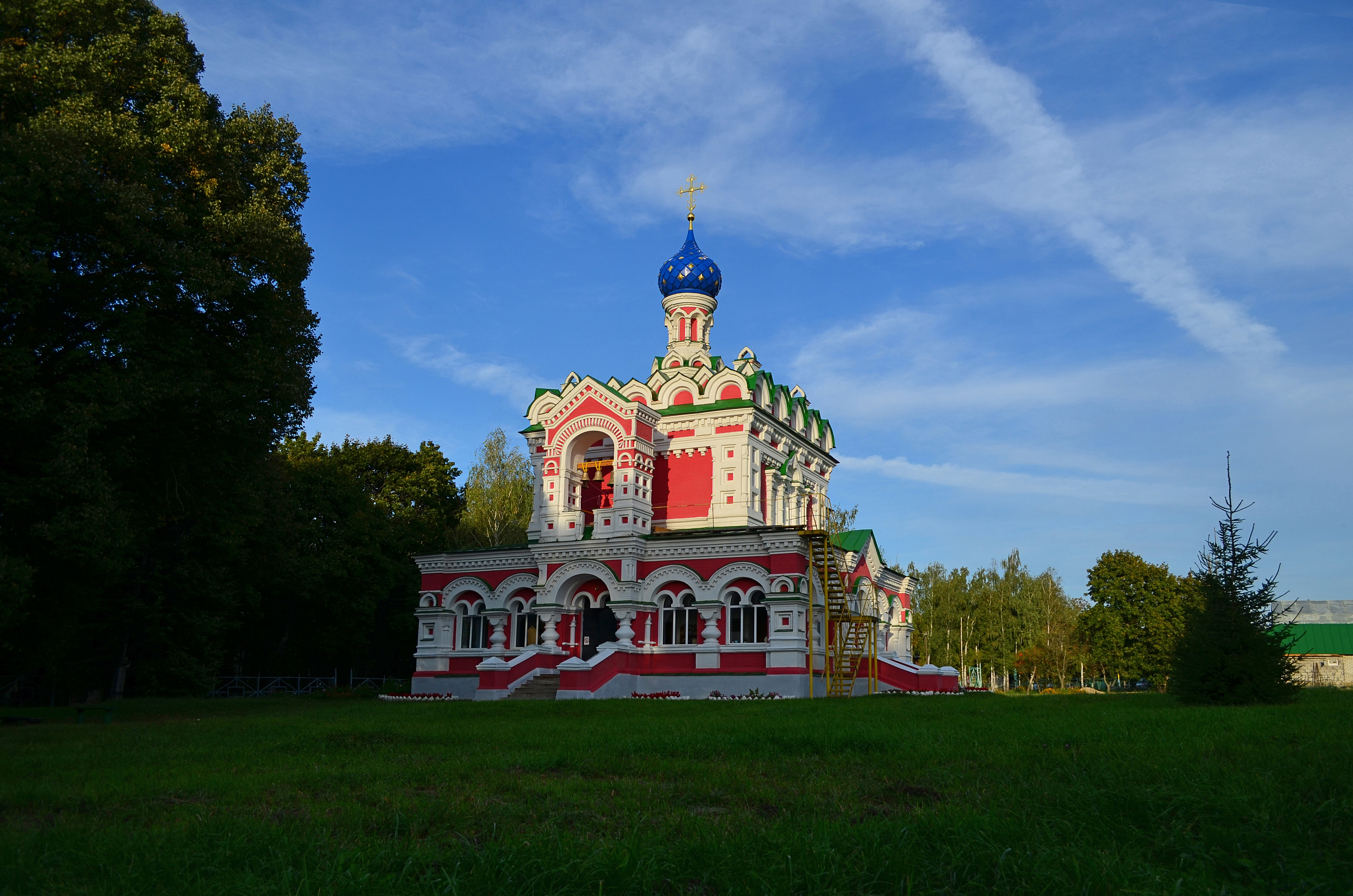 Церковь апостолов Петра и Павла (фамильная): Старожилово, Старожиловский район, Рязанская область